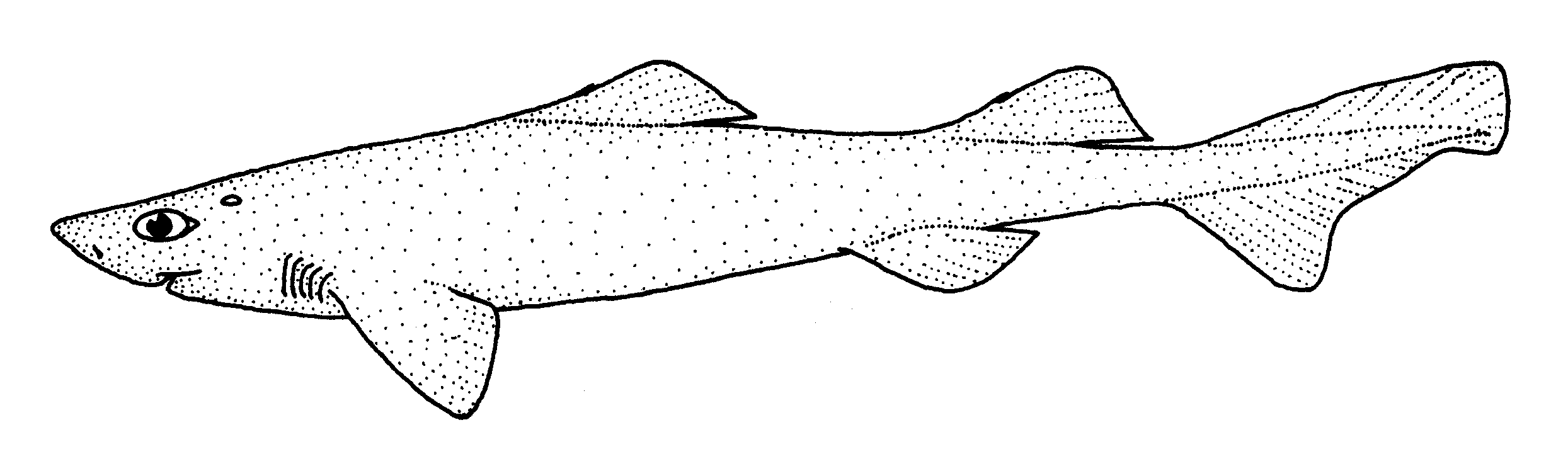 Centroscymnus plunketi (Plunket shark)(Syn. Proscymnodon plunketi (Waite, 1910))